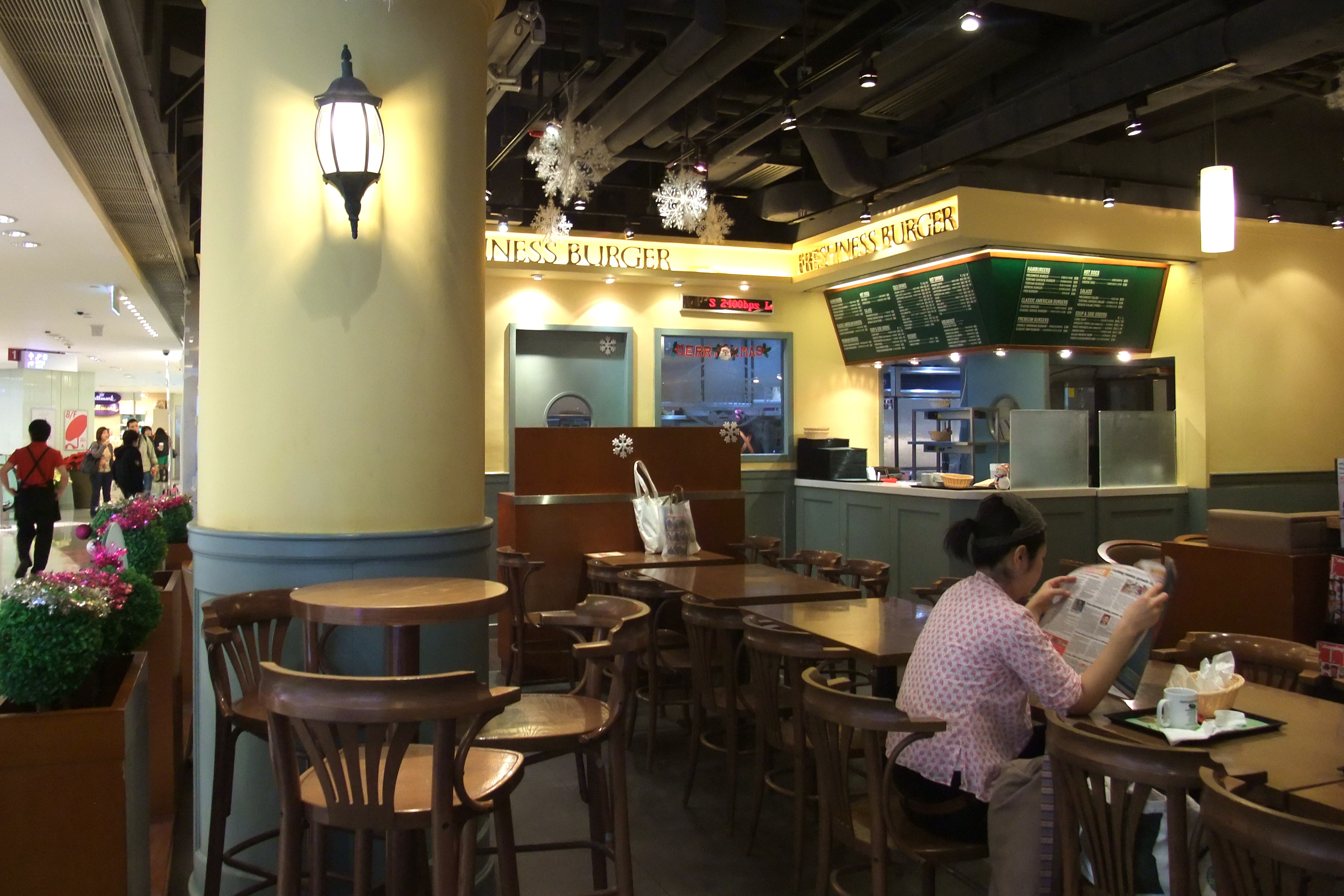 中文（香港）: 位於香港島銅鑼灣皇室堡的Freshness Burger